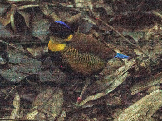 Male Pitta gurneyi, Kao Nor Chuchi, Krabi, Thailand